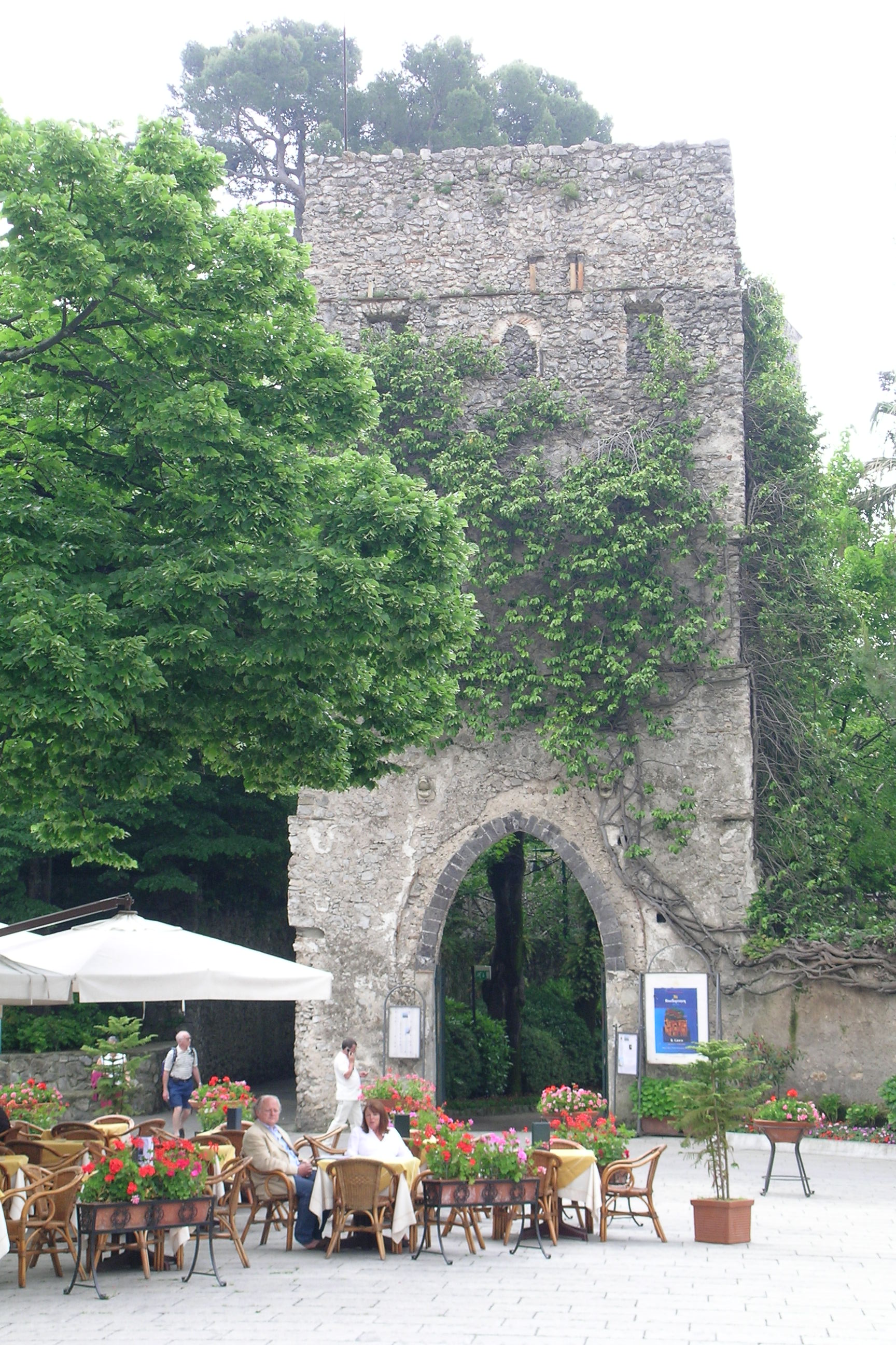 Villa Rufolo Eingang